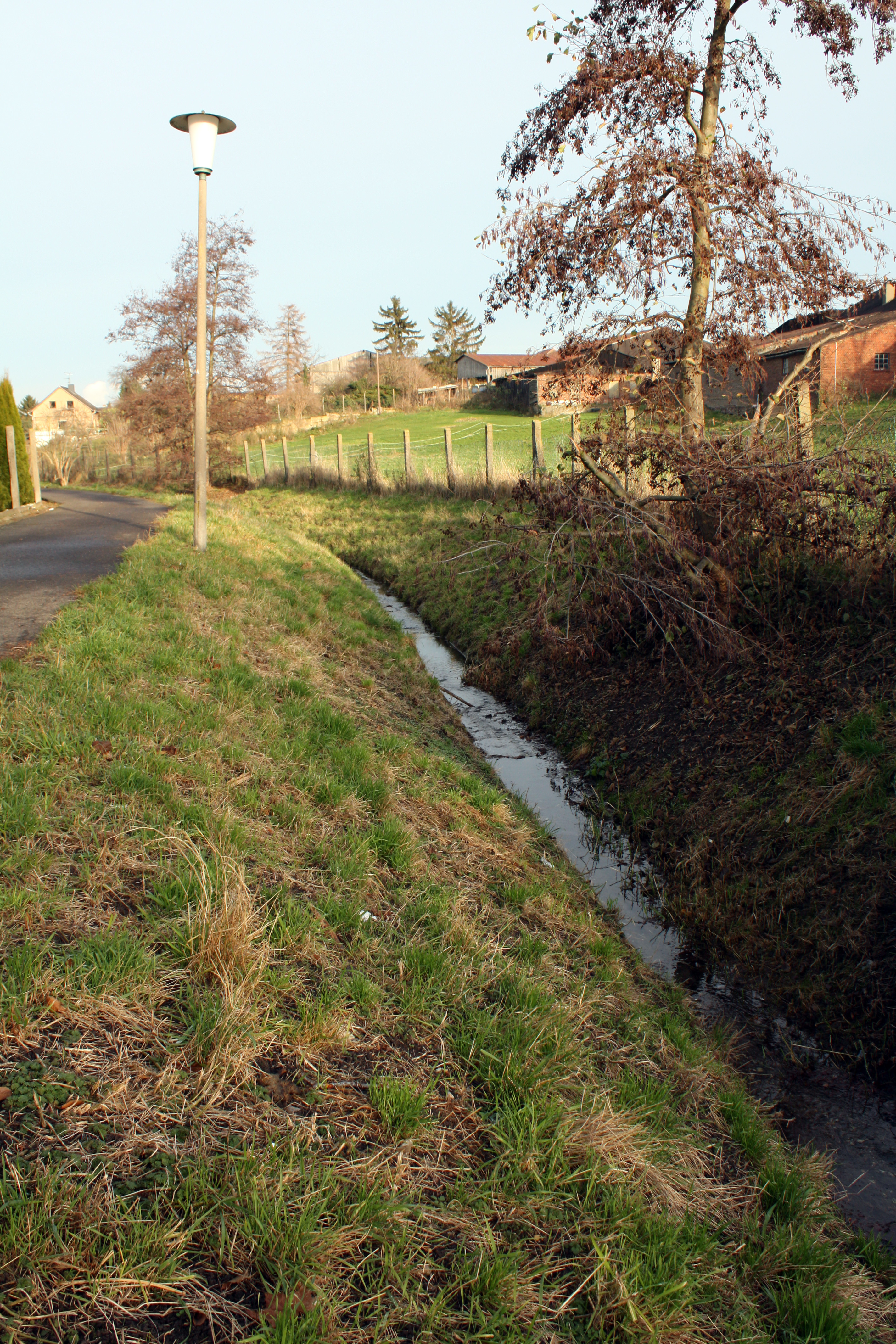 Erftstadt-Erp, der Erpabach